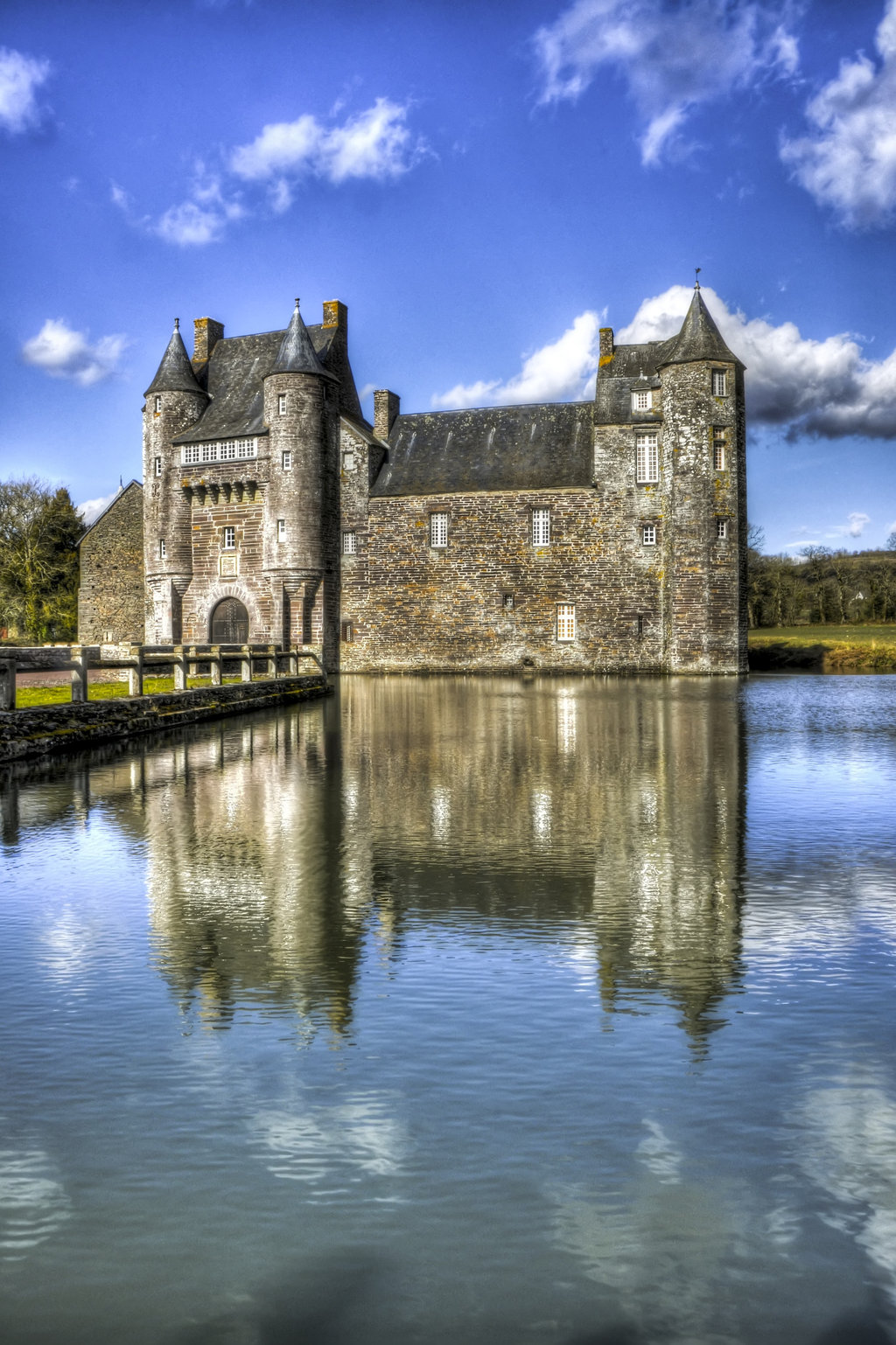 Photographie HDR du château de Trécesson .